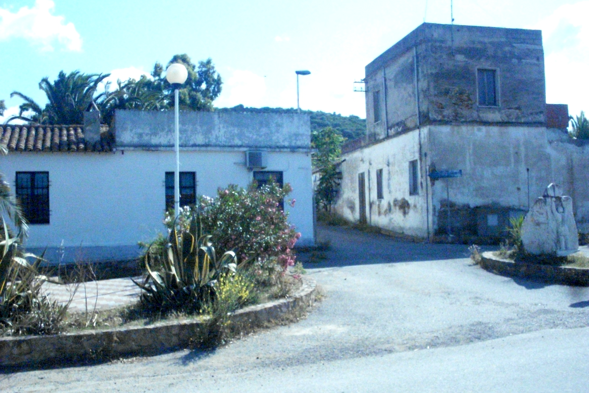 Frazione Is Carillus (comune di Teulada)